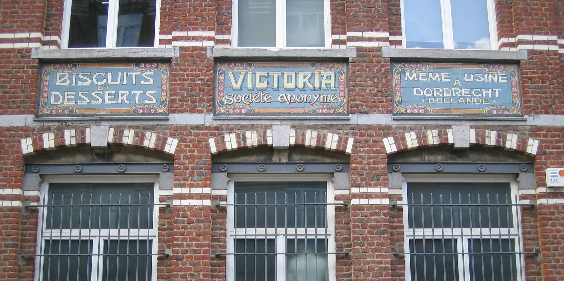 Usine Victoria, rue De Neck. Koekelberg. Céramiques non signées.